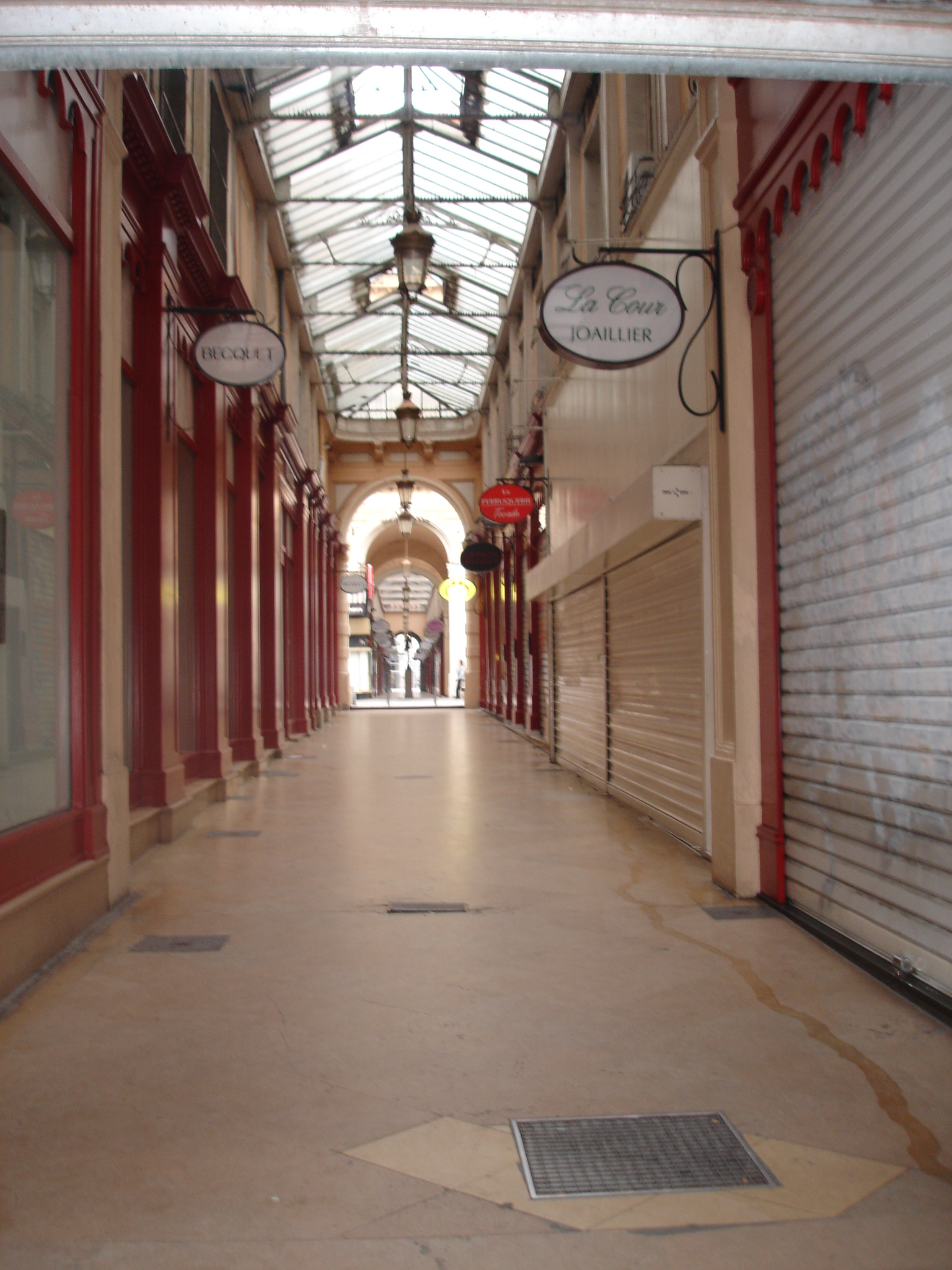 Lyon centre : Le passage de l'argue côté Jacobins